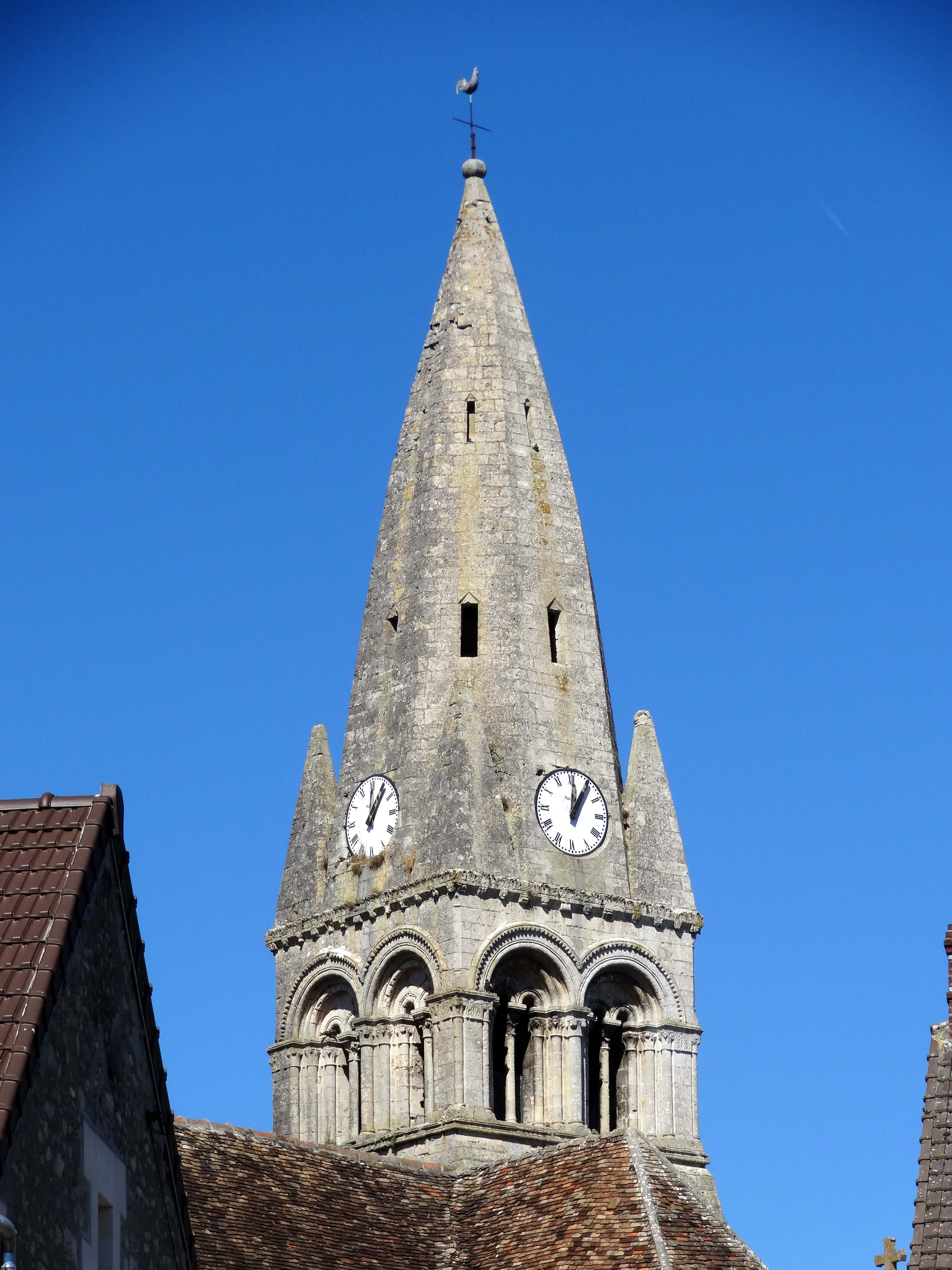 Église Sainte-Geneviève de Marolles - voir titre.